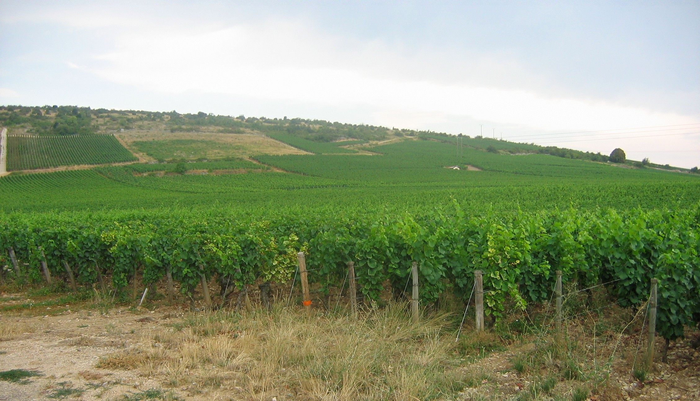 Vignoble de Nuits-Saint-Georges, Bourgogne, France.